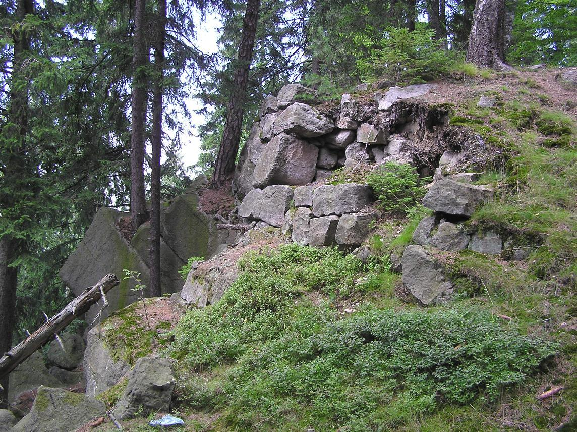 Pozostałości Fortu Fryderyka/Blokhauz (niem. Fort Nesselgrund). Ta niewielka budowla (7x30 m) wzniesiona przez majora B. von Rauchawzniesionego pod koniec XVIII wieku z rozkazu Fryderyka Wilhelma II, wykorzystywała naturalne ukształtowanie terenu poprzez włączenie w swój obwód urwiska skalnego. Fort nigdy nie odegrał żadnej roli militarnej i z czasem został rozebrany.